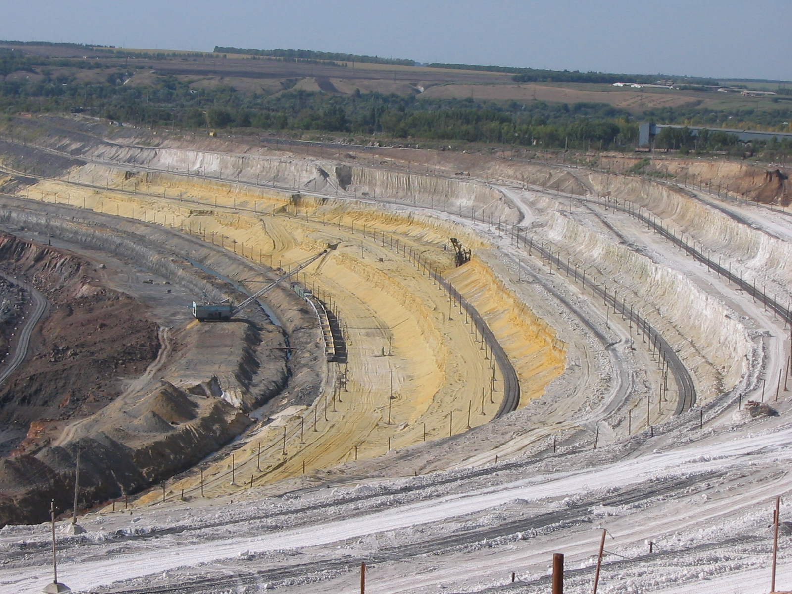 Карьер Лебединского ГОКа. Белгородская область.